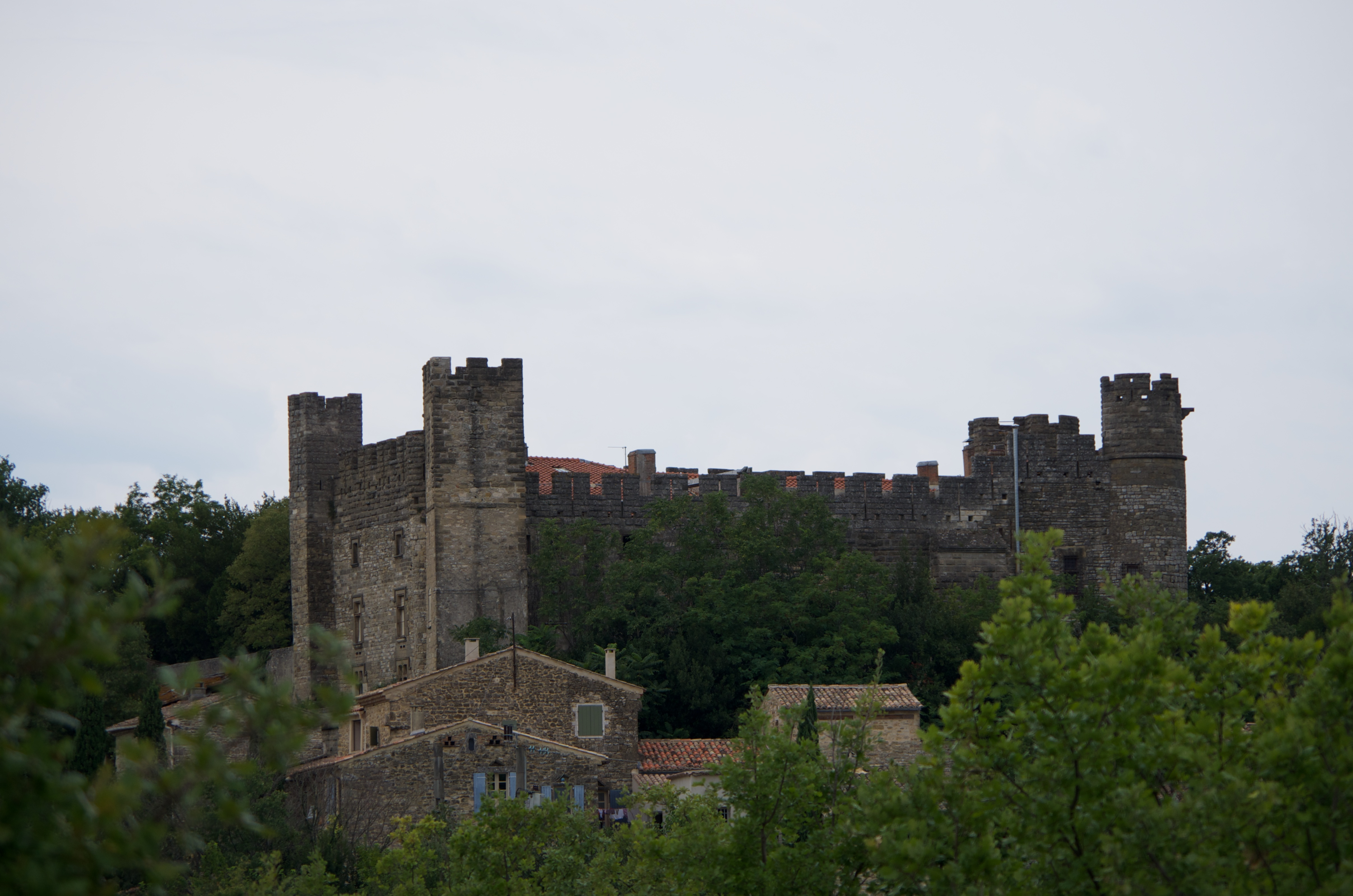 Château